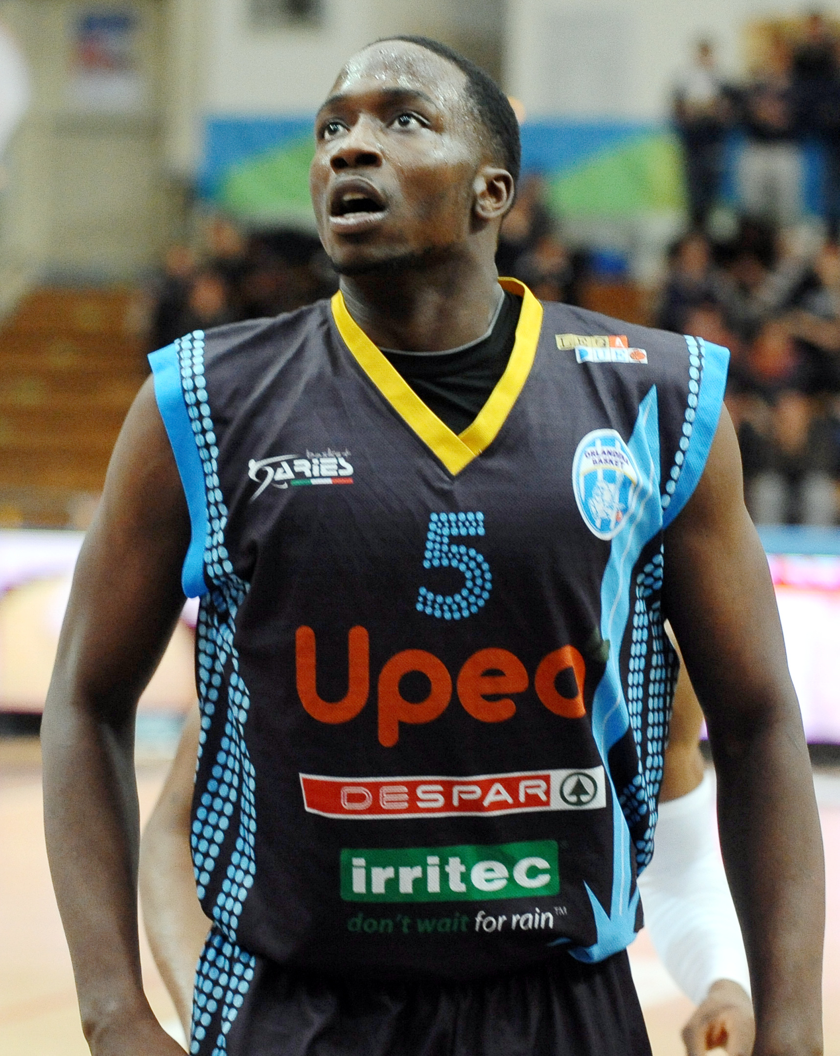 Alex Young con la maglia dell'Orlandina Basket al PalaTrento.